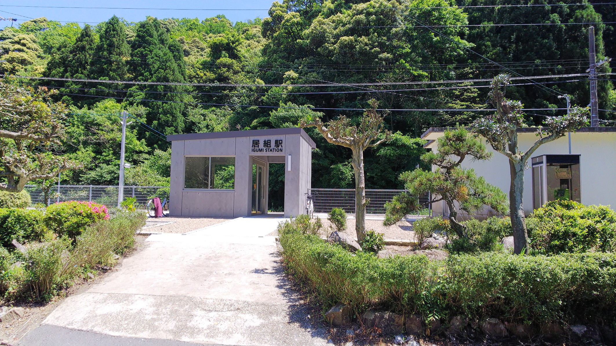 西日本旅客鉄道 山陰本線 居組駅 待合室のみの駅舎になった（コンクリート製）